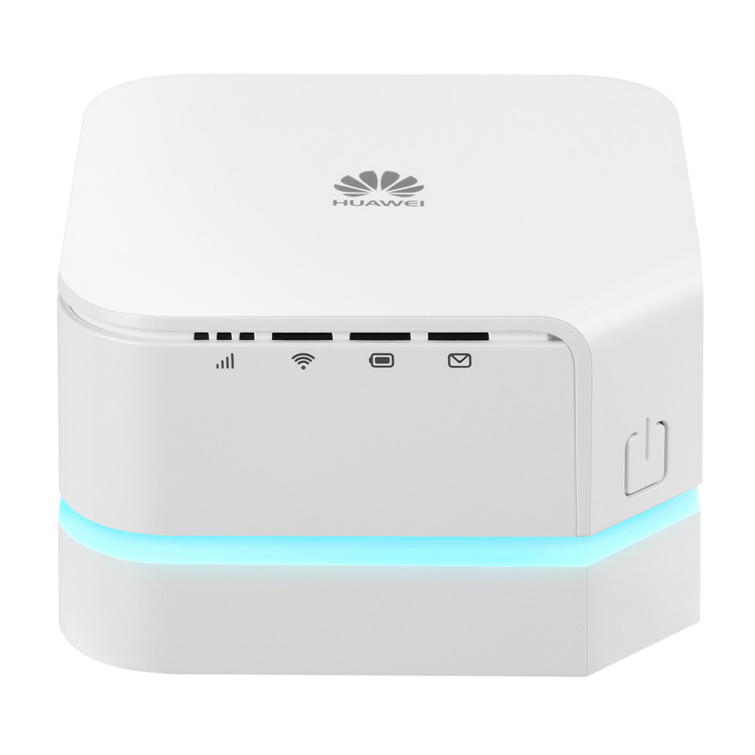 Routeur wifi 4G avec ces 4 indicateurs dans l'ordre : - Qualité réseau - WIFI - Batterie - Mail